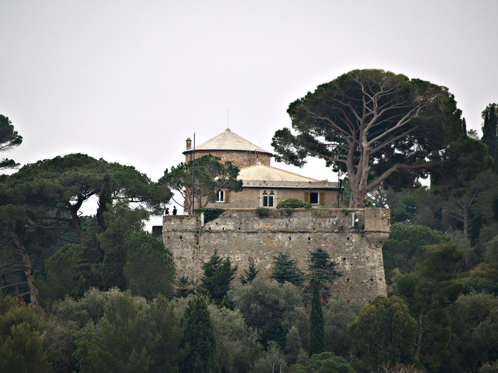 Castello Brown di Portofino, Liguria, Italia